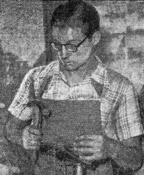 José Beyaert en juillet 1944, dans la cordonnerie de son père (futur champion olympique de la course cycliste en ligne, à Londres en 1948).